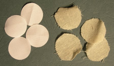 Współczesne flejtuchy do broni odprzodowej